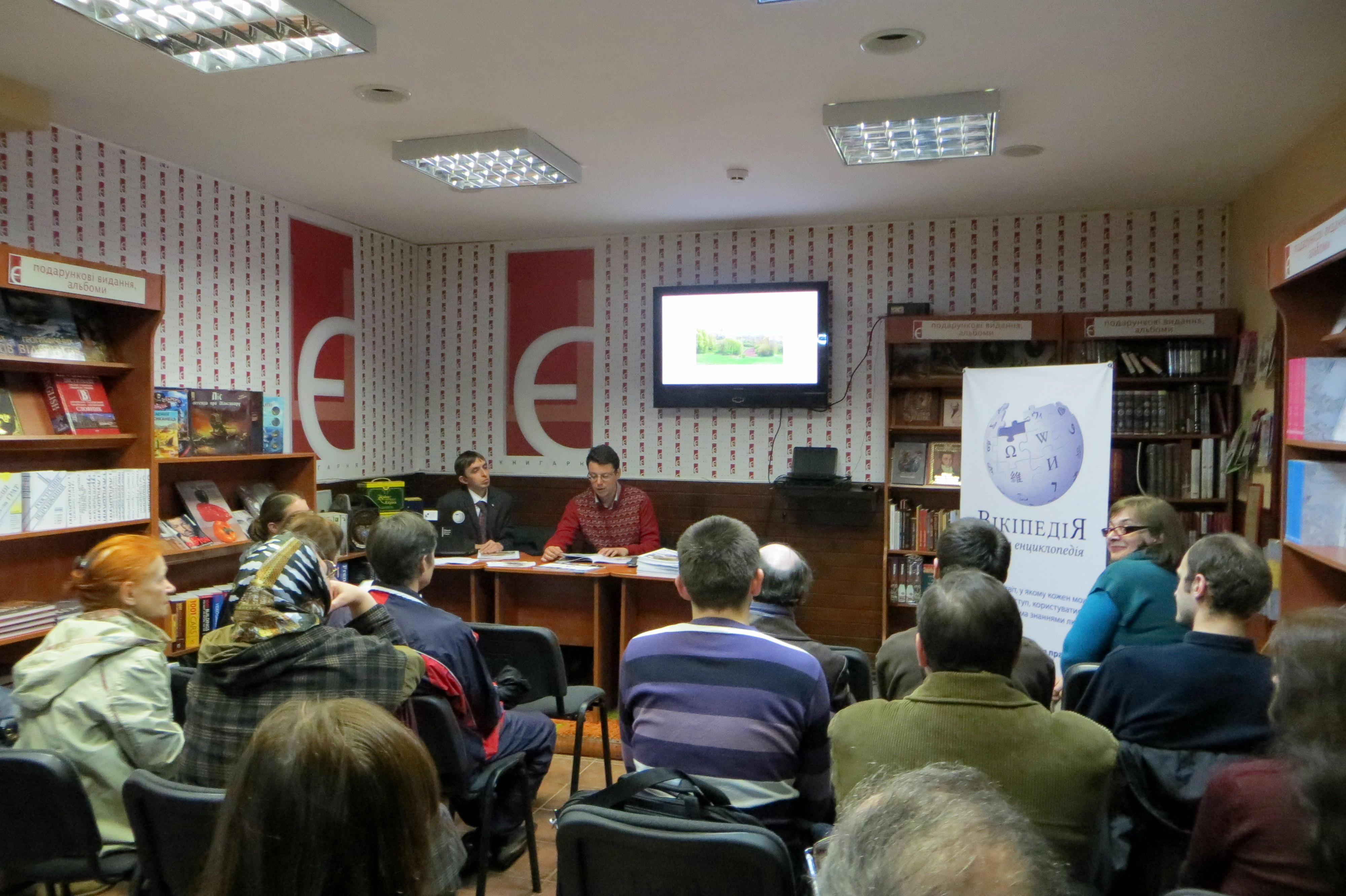 Презентація журналу «Пам'ятки України» (№ 2, 2016) зі статтями та фото учасників конкурсу «Вікі любить пам'ятки» 25 квітня у м. Харків, Книгарня «Є».